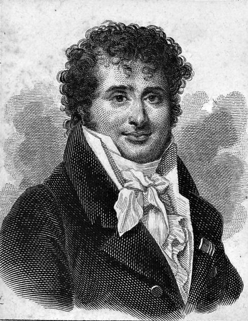 Marc-Antoine Désaugiers, French songwriter